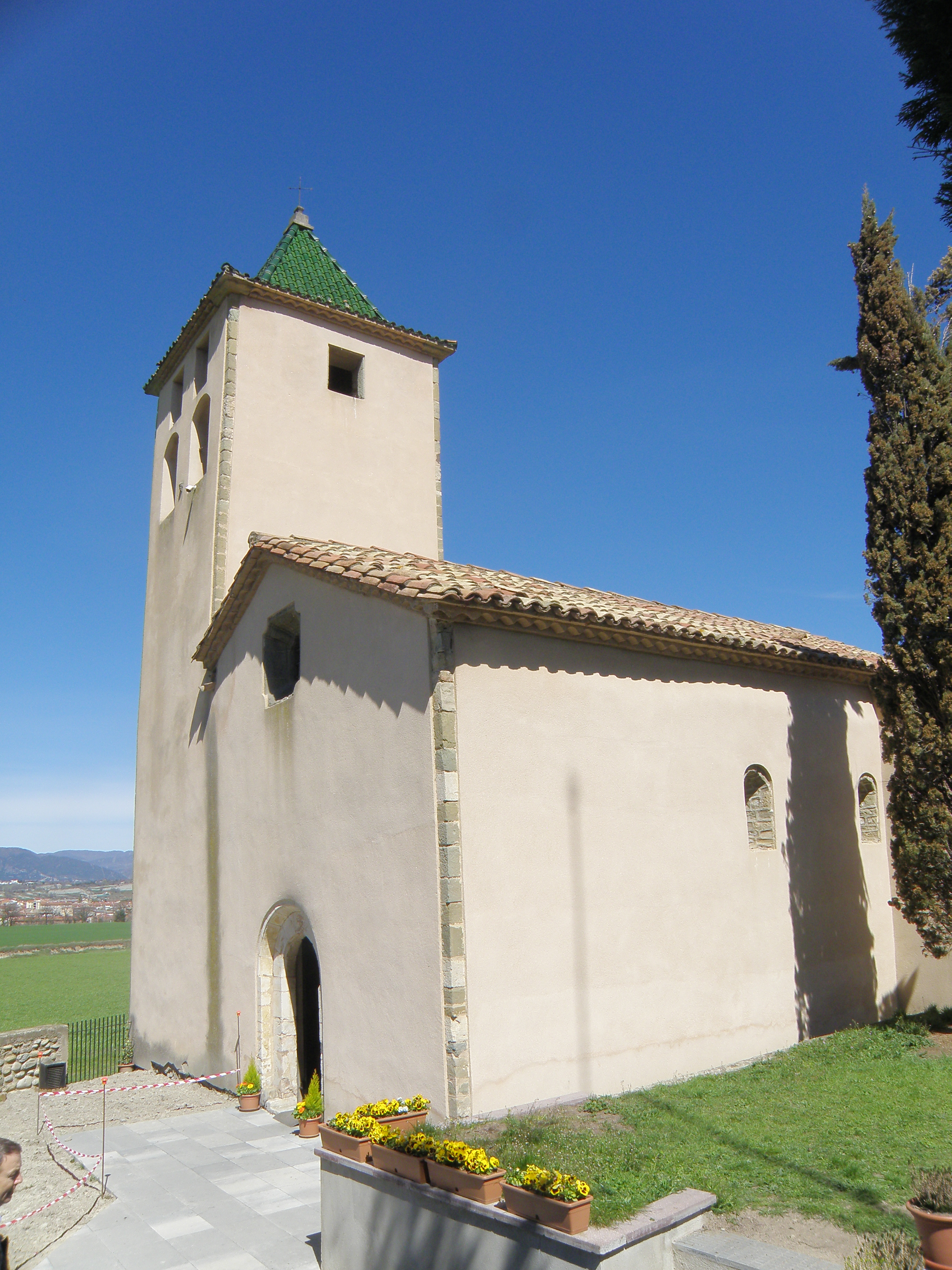 Vista desde el Mas Fugurull